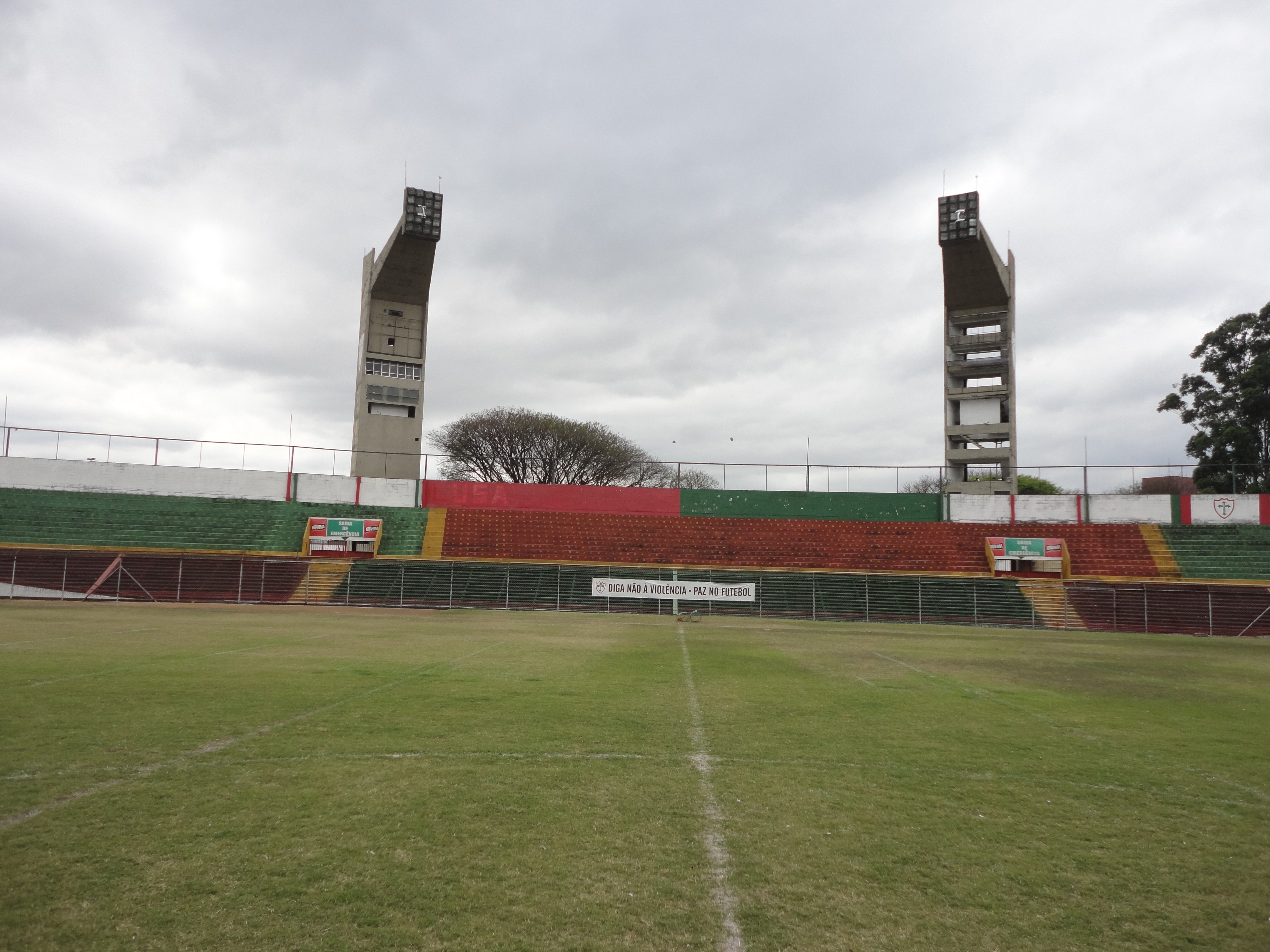 Vista do gramado do Canindé, em São Paulo, Brasil